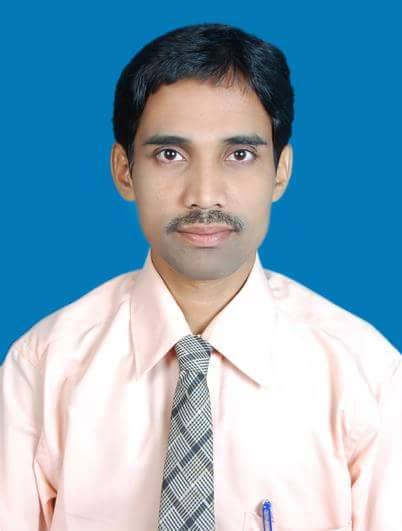 గవిడి శ్రీనివాస్